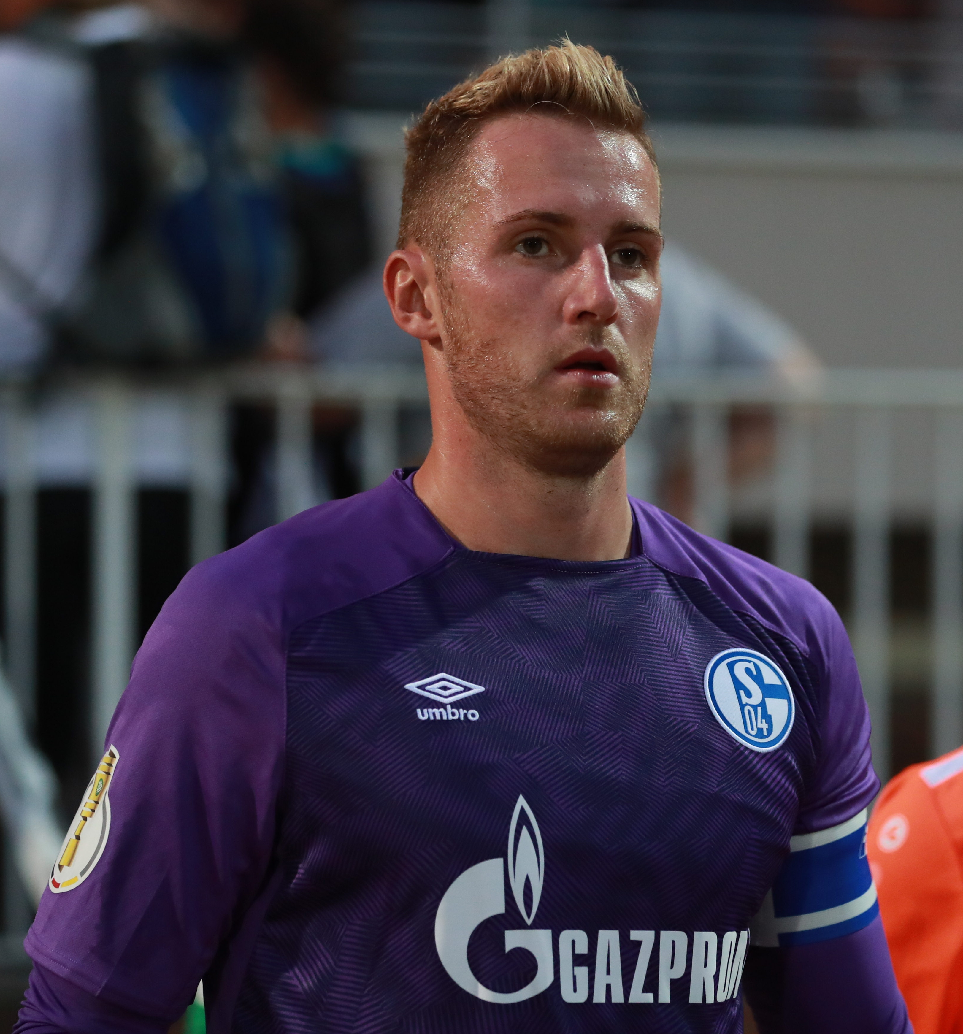 DFB-Pokal 2018/19, 1. Hauptrunde: 1. FC Schweinfurt 05 gegen FC Schalke 04 0:2 (0:1)